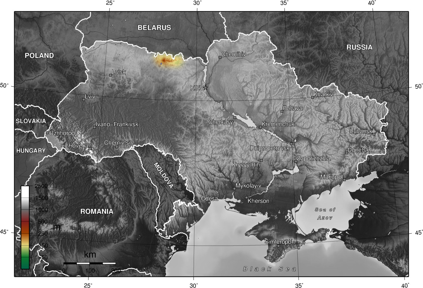 Slovechno-Ovruch_highland